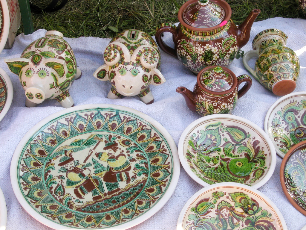 Традиційна українська кераміка. Косівська кераміка. Країна мрій. Київ. Україна.